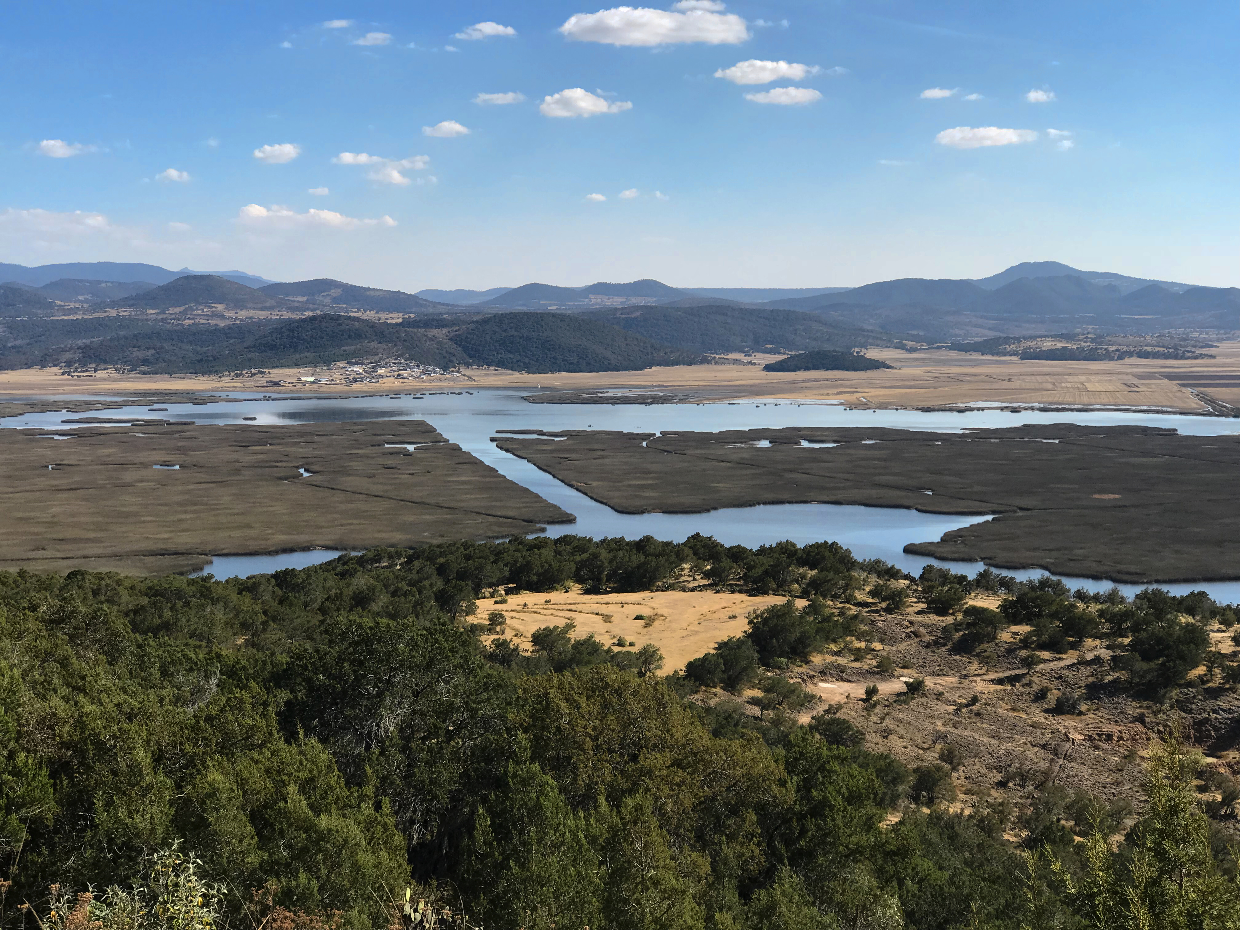 Laguna de Tecocomulco.